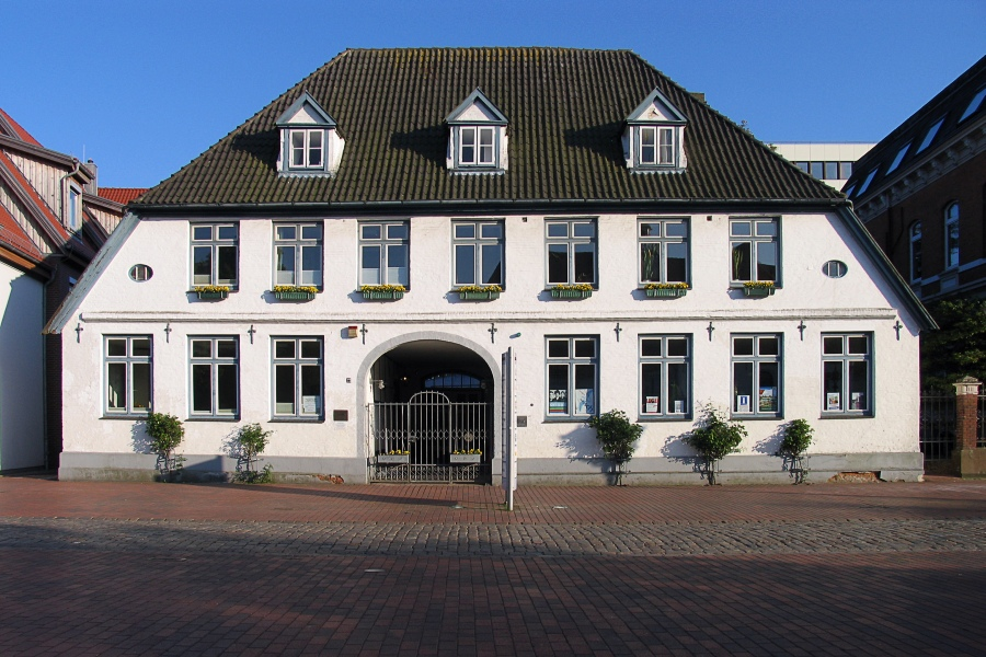 Altes Pastorat in Heide (Holstein).